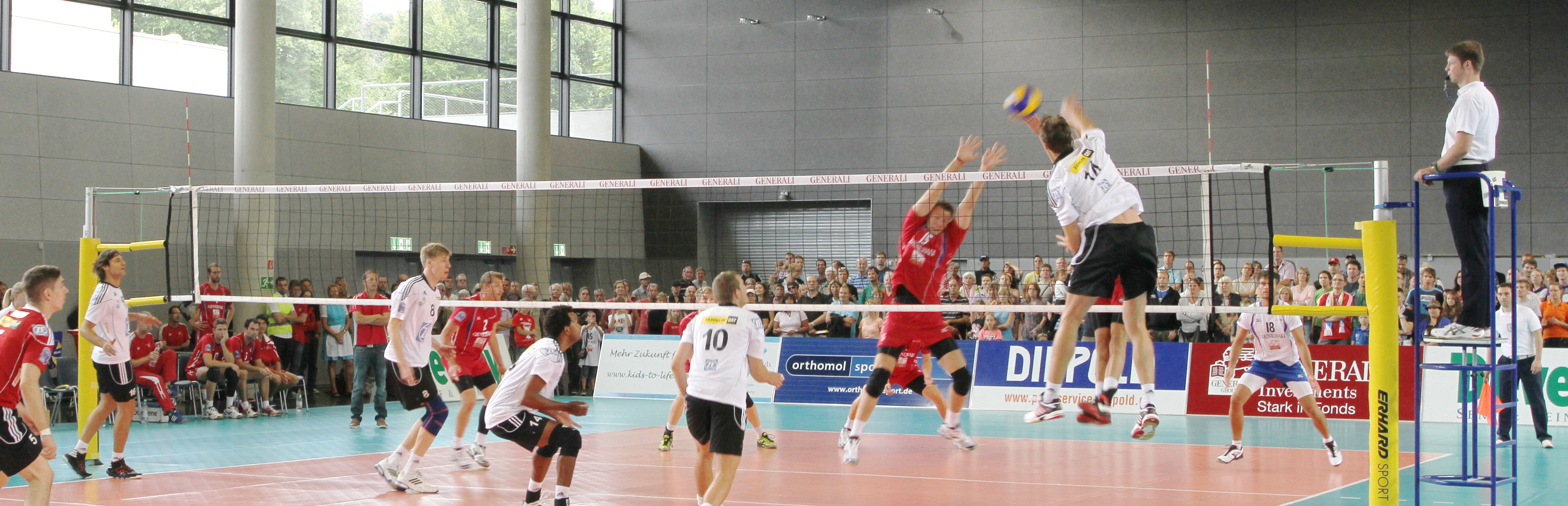 Volleyballspiel TSV Unterhaching - VfB Friedrichshafen, am 26. August 2012 in der Münchner Kleinen Olympiahalle. Das Spiel diente der Saisonvorbereitung. Als Panorama beschnitten.